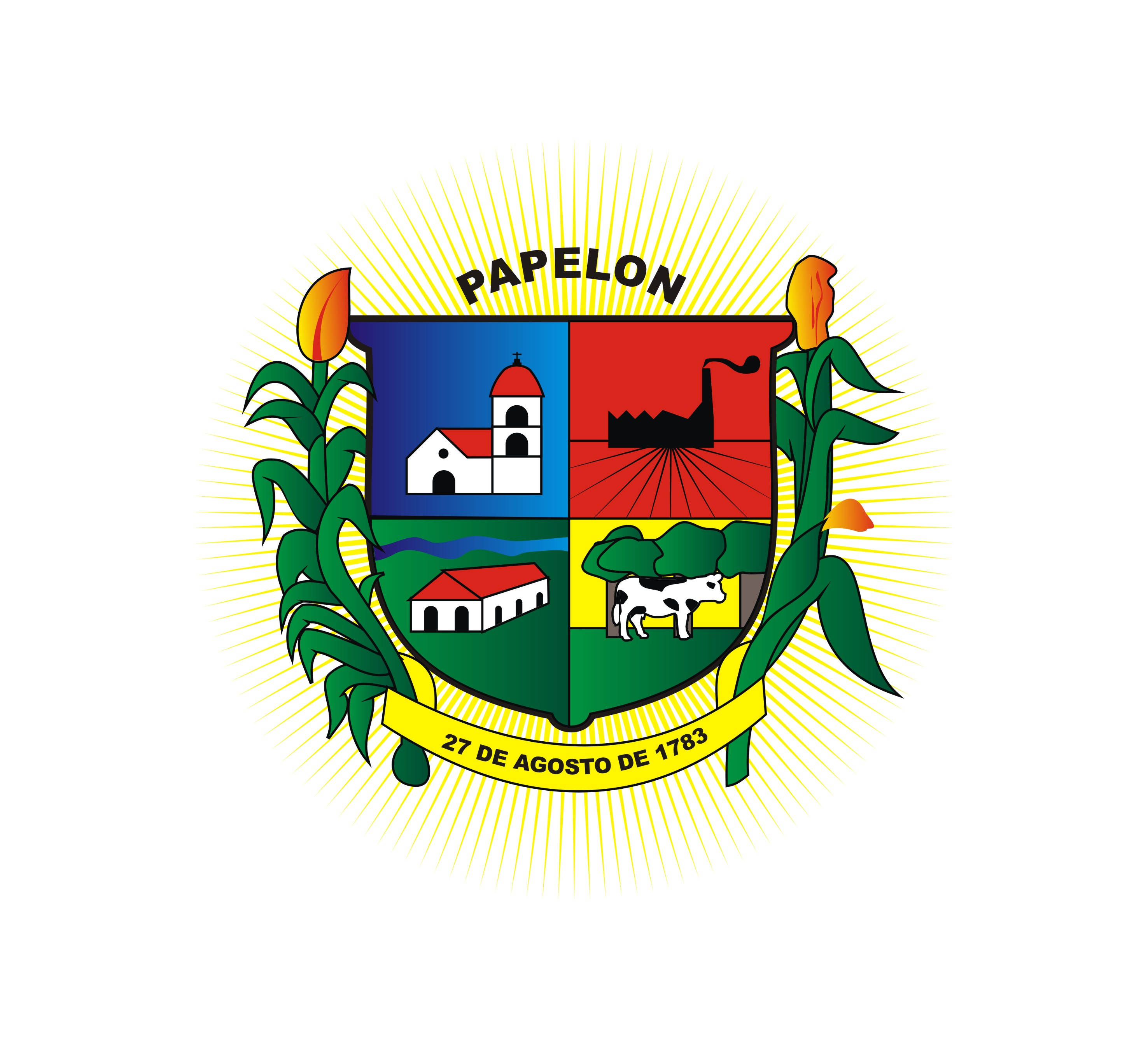 Escudo Municipio Papelon